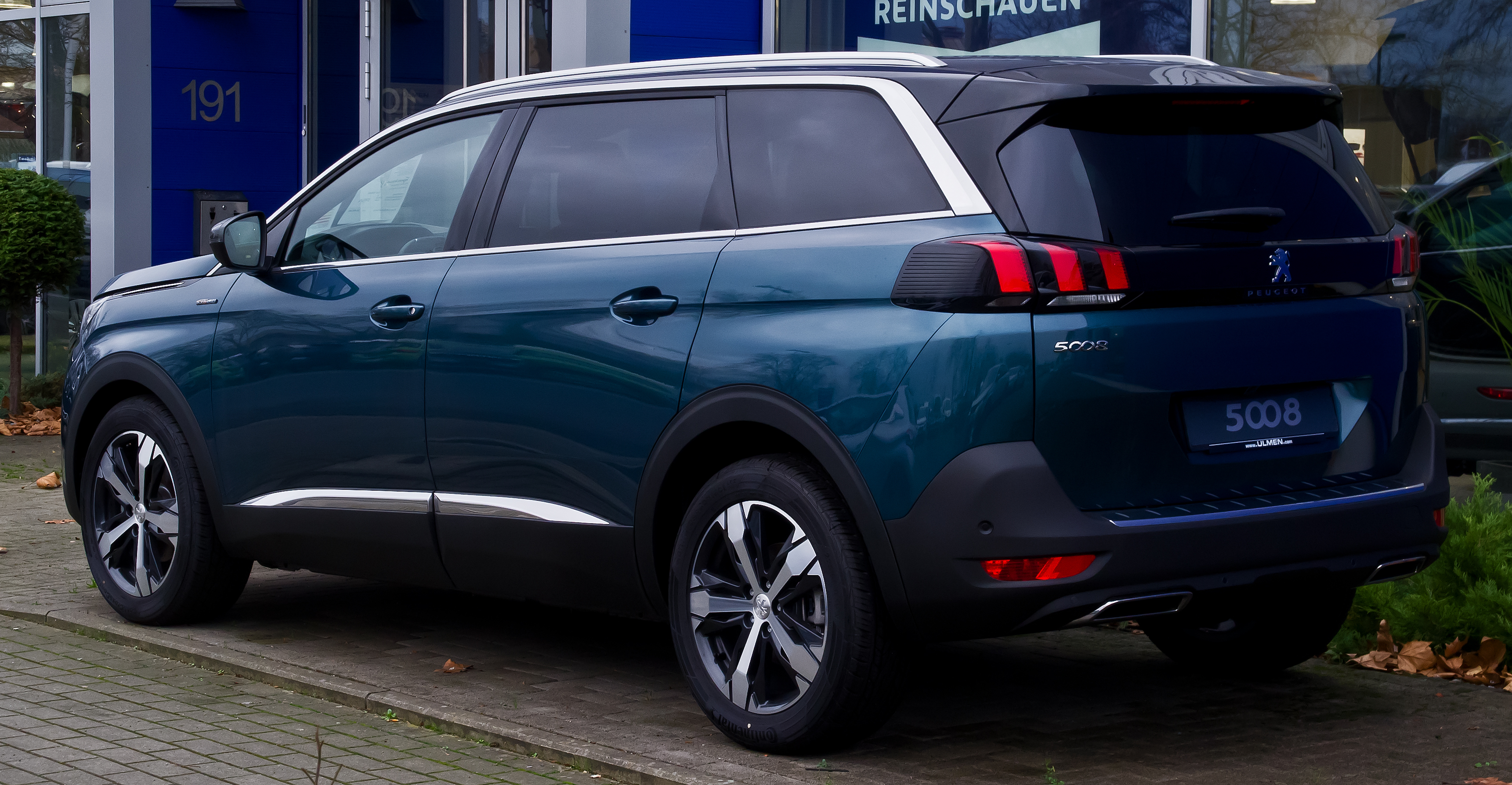 Peugeot 5008 PureTech 130 EAT6 Allure GT-Line (II)